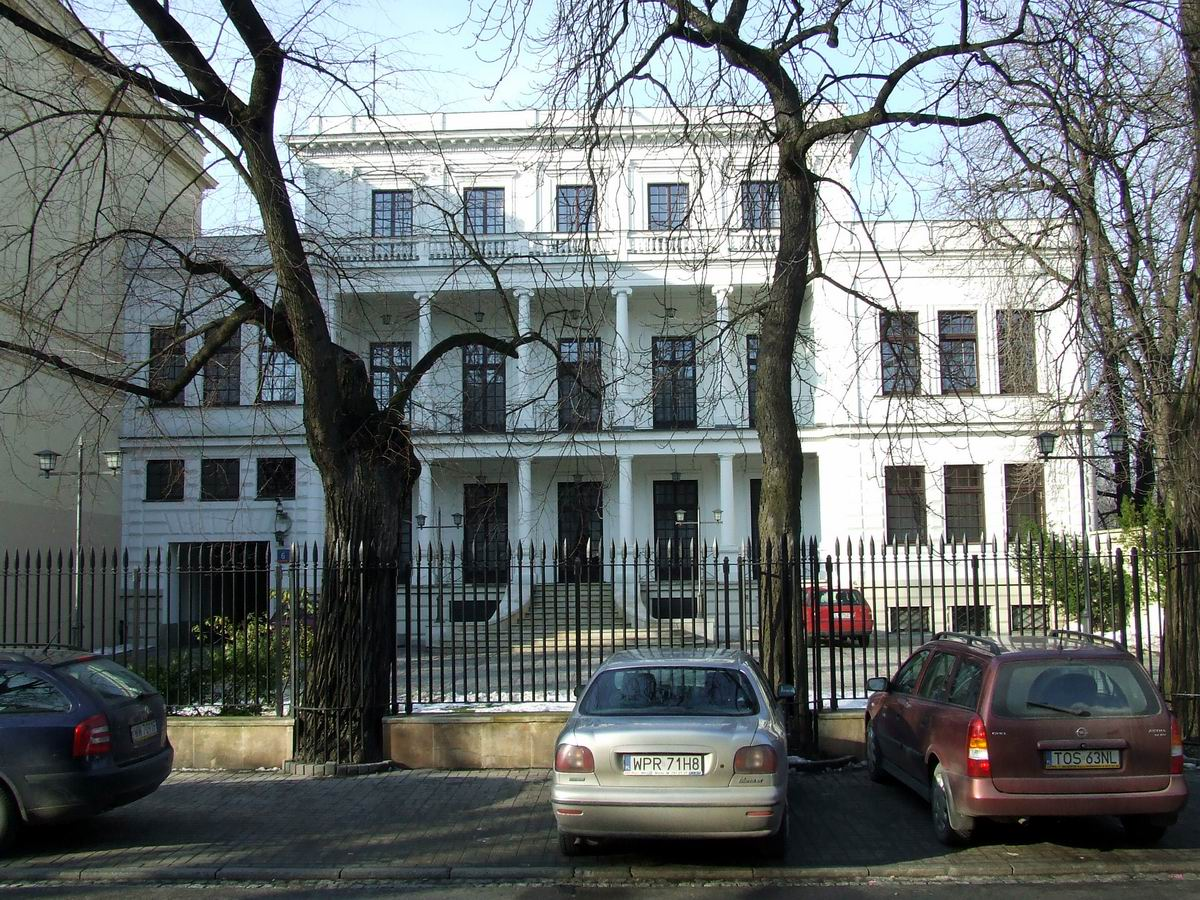 Pałac Przeździeckich, ul. Foksal 6, Warszawa